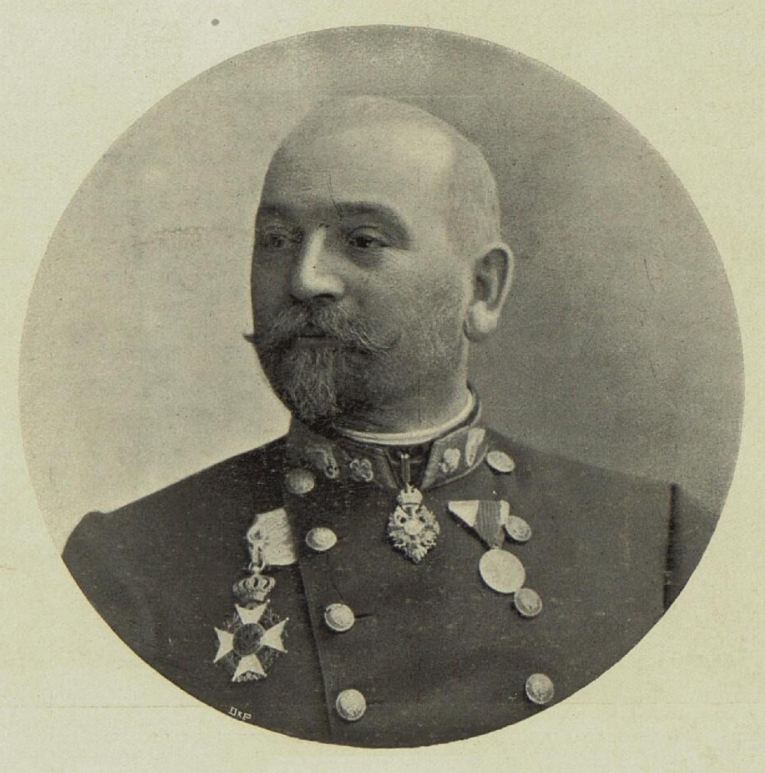 Karel Marek (1850-1936), český dopravní odborník, rakousko-uherský, respektive předlitavský státní úředník a politik, v roce 1911 ministr veřejných prací